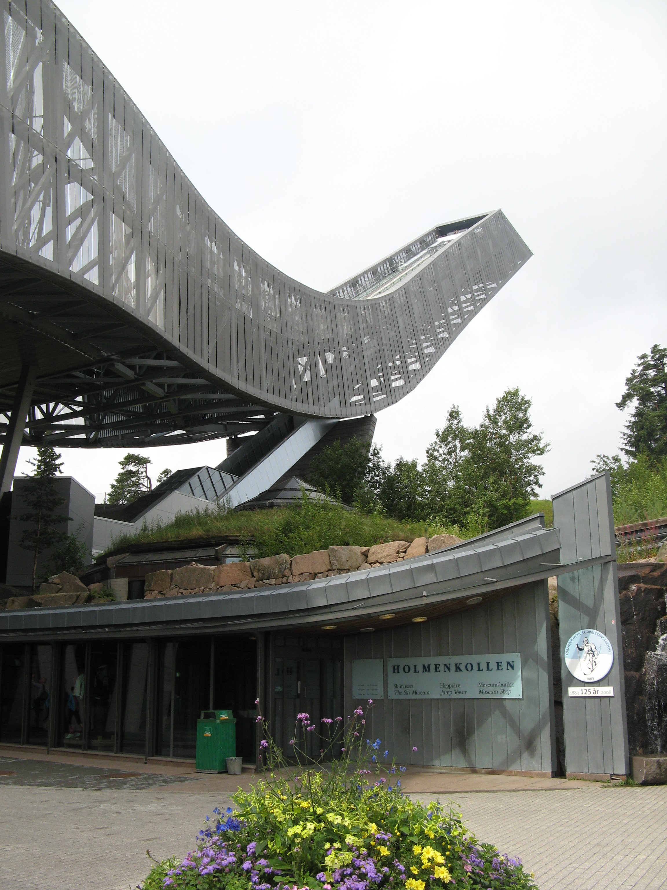 Holmenkollen-Skischanze